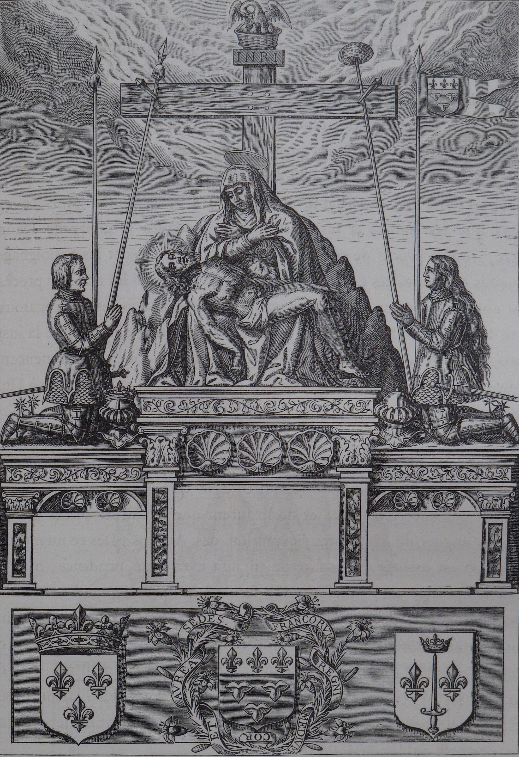 Monument à Jeanne d'Arc, reconstruit en 1572 (en remplacement du précédent détruit), détruit en 1792. Construit à Orléans sur le pont. D'après une estampe de Léonard Gaultier.